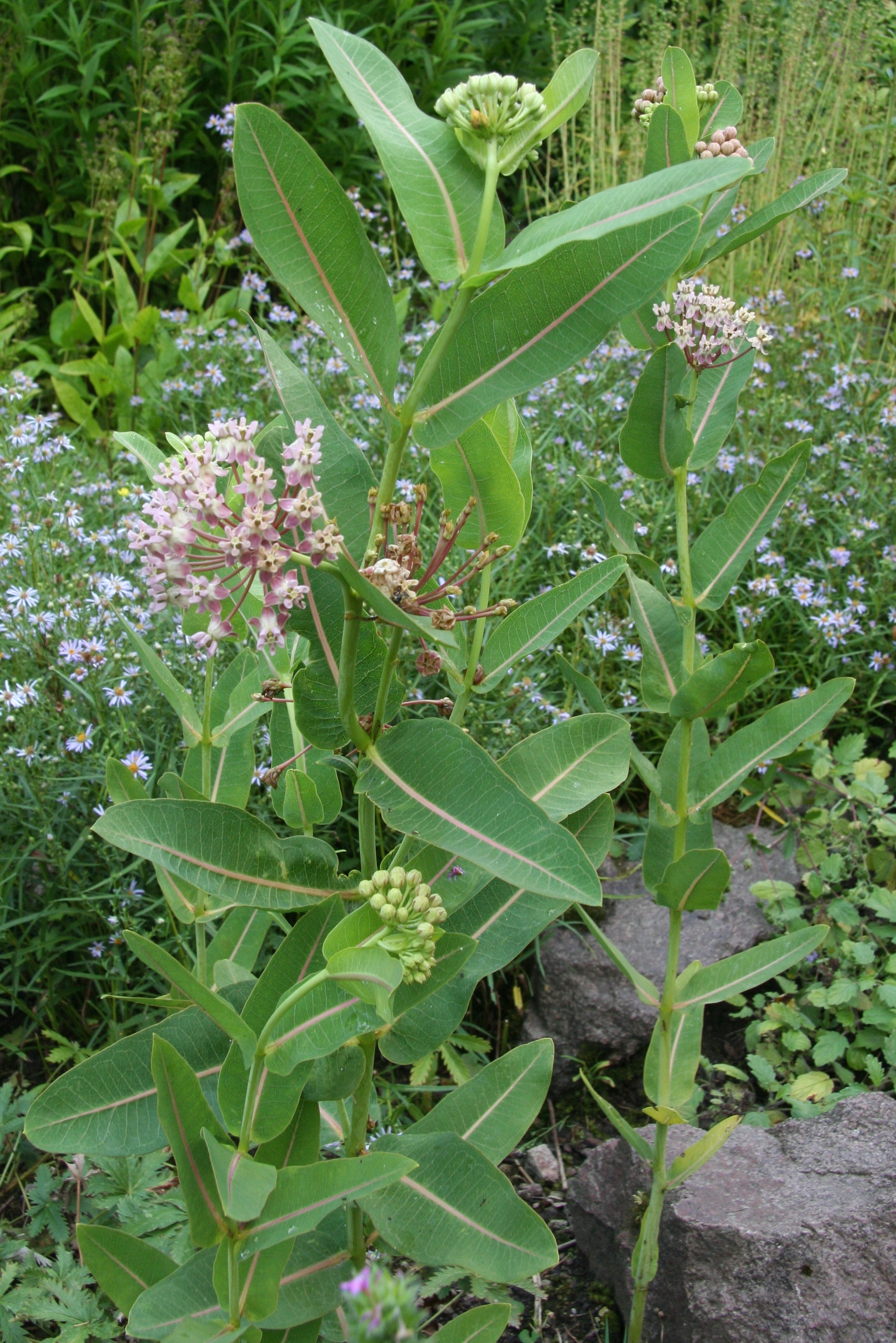 Asclepias syriaca im Botanischen Garten Dresden